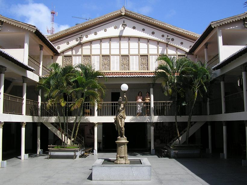 Teatro Alberto Maranhão, em Natal, Brasil.